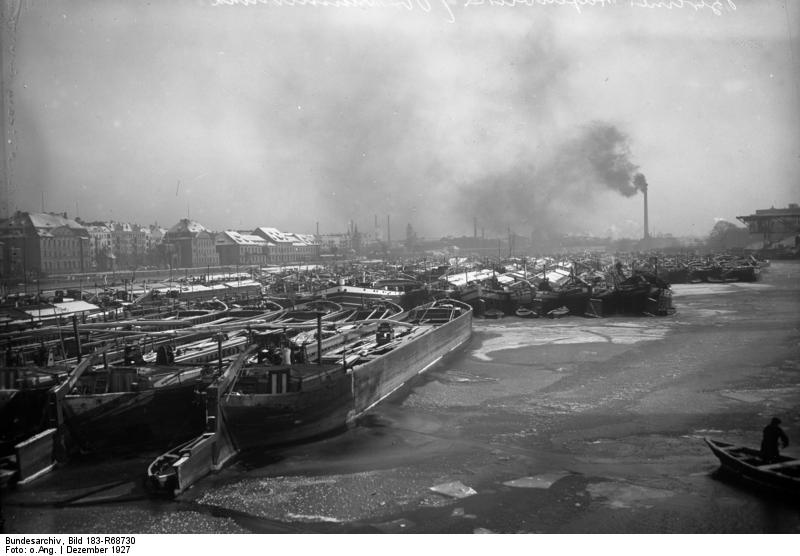 Berlin, Kälteeinbruch, Osthafen Die Berliner Häfen vereist, 1927 Grosse Schlepperflotten im Berliner Hafen, die infoge der rasch-heringebrochener Kälte eingefroren sind und auf Tauwetter warten. ADN-ZB/Archiv Berlin im Dezember 1927 Wegen des plötzlichen Kälteeinbruchs liegen in den Häfen der Stadt viele Schlepper und Lastkähne fest, hier im Osthafen an der Oberbaumbrücke.